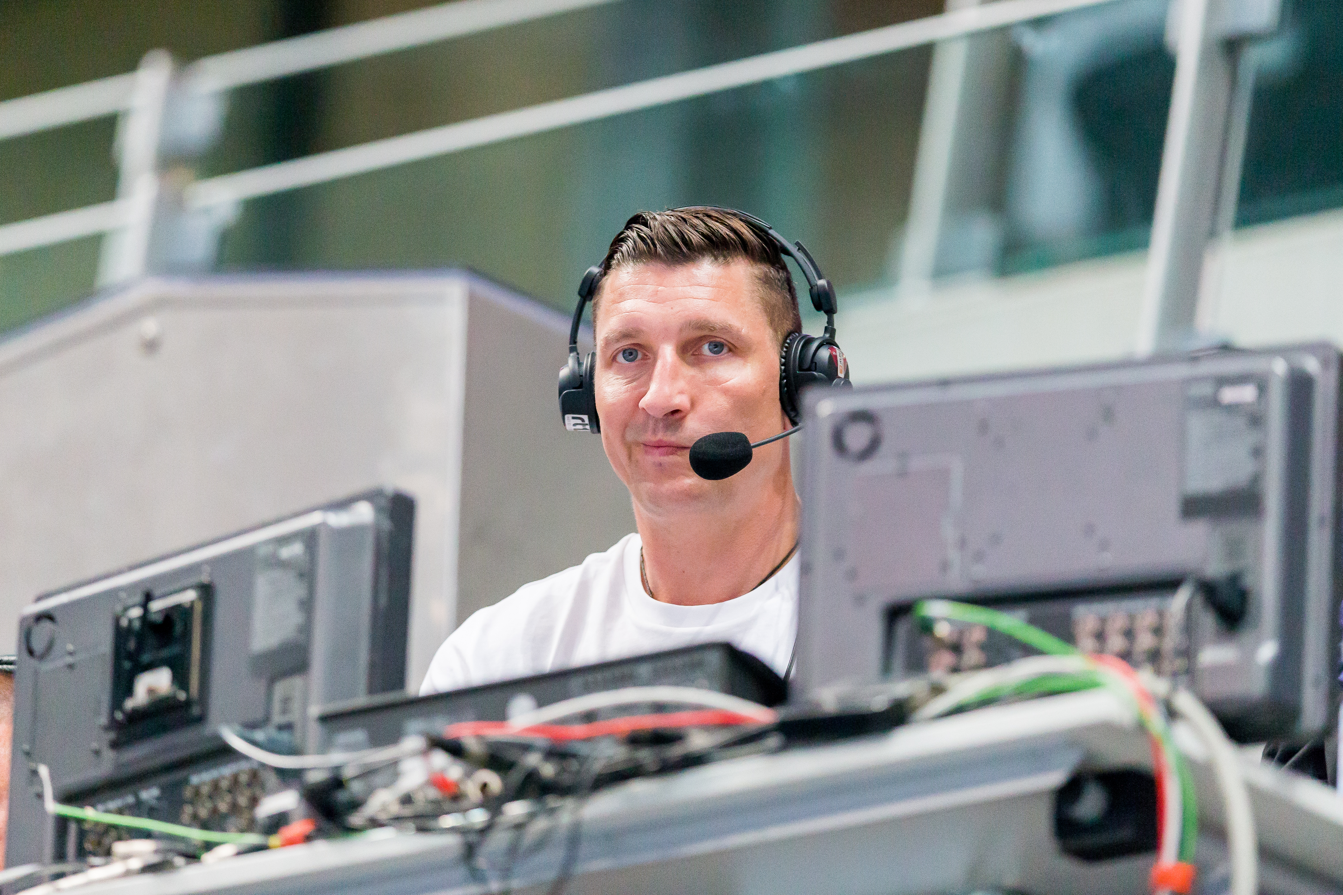 International Handball friendly match between Germany and Russia during Handball Deutschland vs Russland (25:27) at SAP Arena, Mannheim, Baden Württemberg, Germany on 2016-06-08, Photo: Sven Mandel